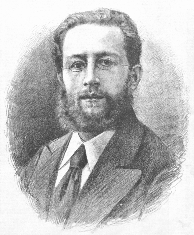 Ladislav Zavrtal (1849-1942) byl byl italsko-český hudební skladatel, dirigent a violista. Portrét, nakreslený Janem Vilímkem pro Humoristické listy.